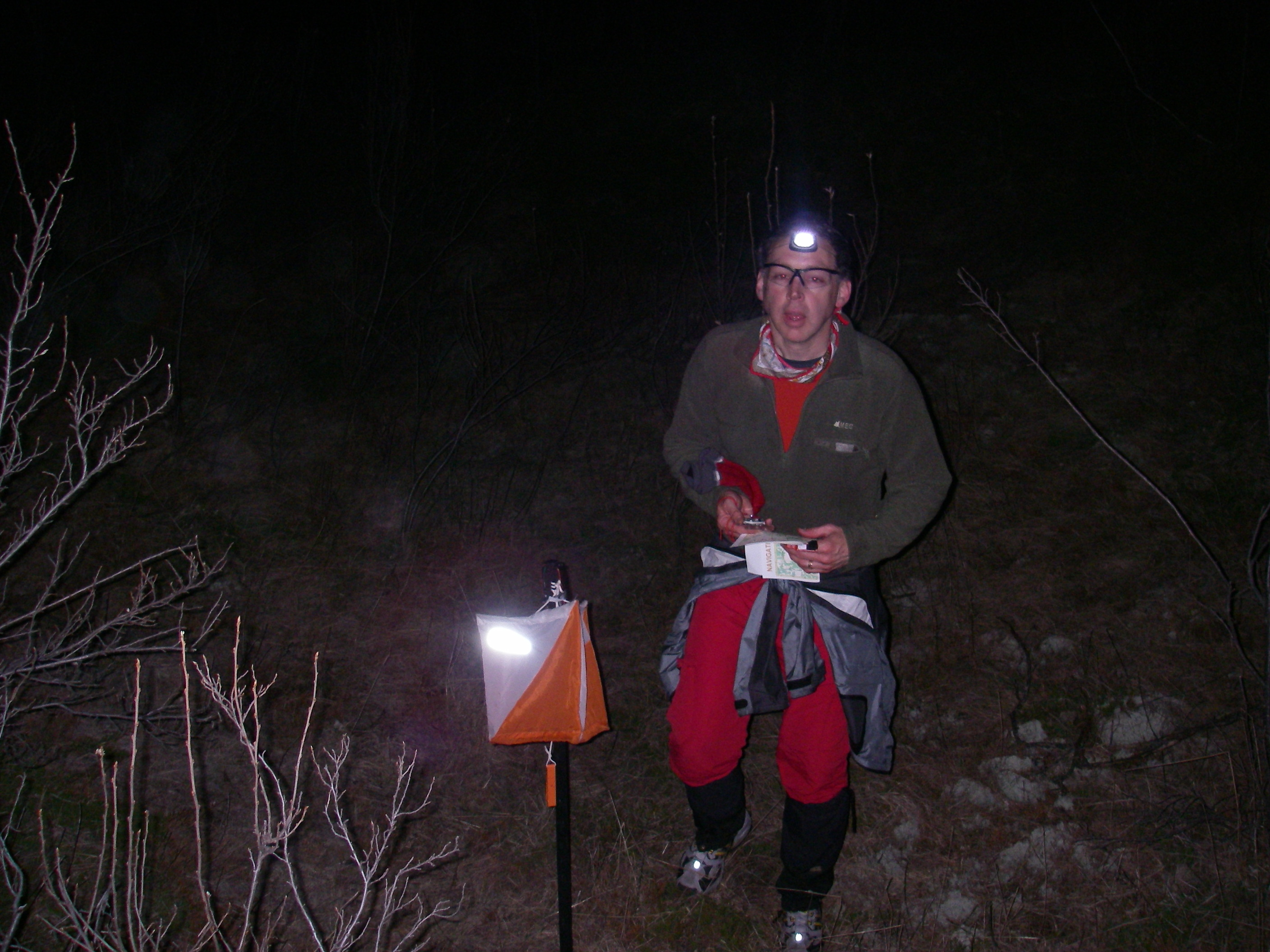 Night Orienteering